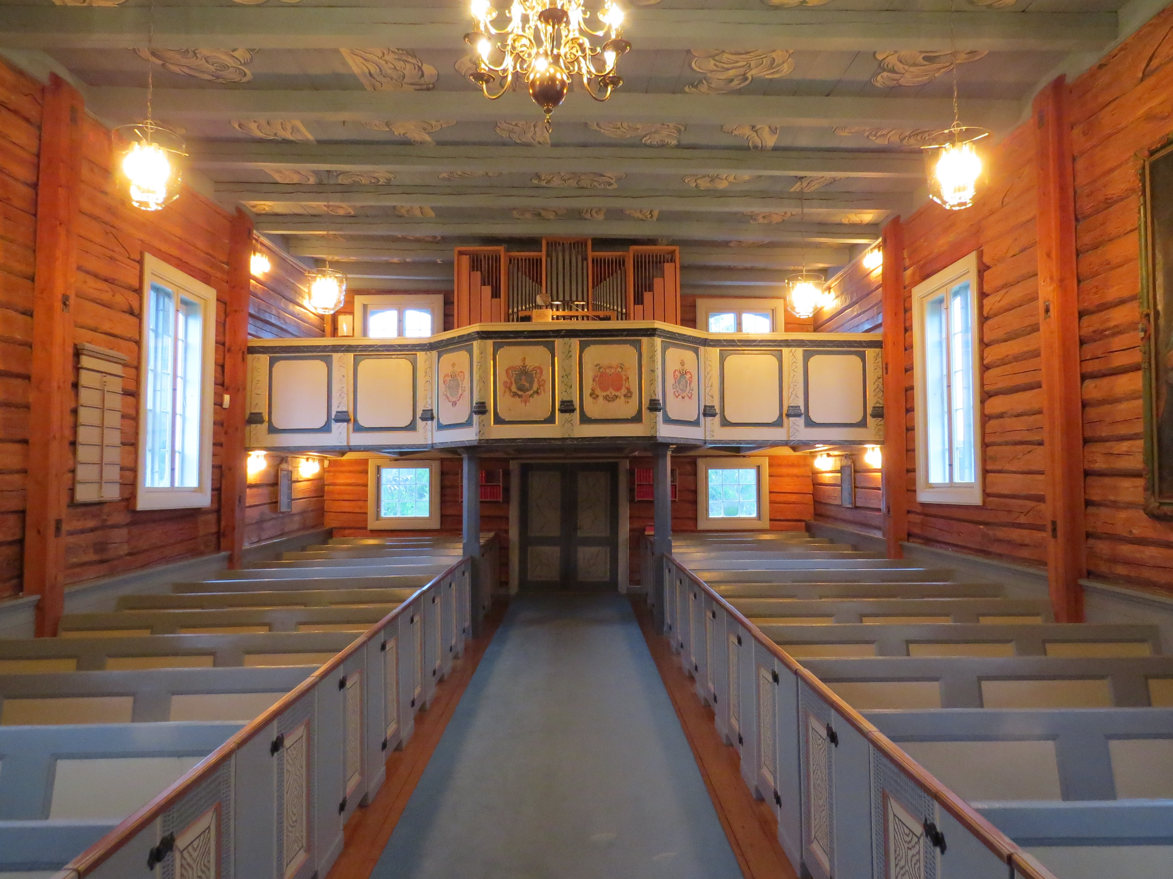 Løvenskioldstol og orgel i Mælum kirke, Telemark